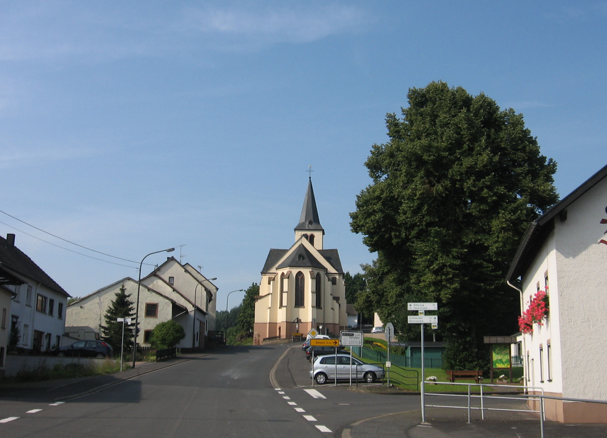 Lasel